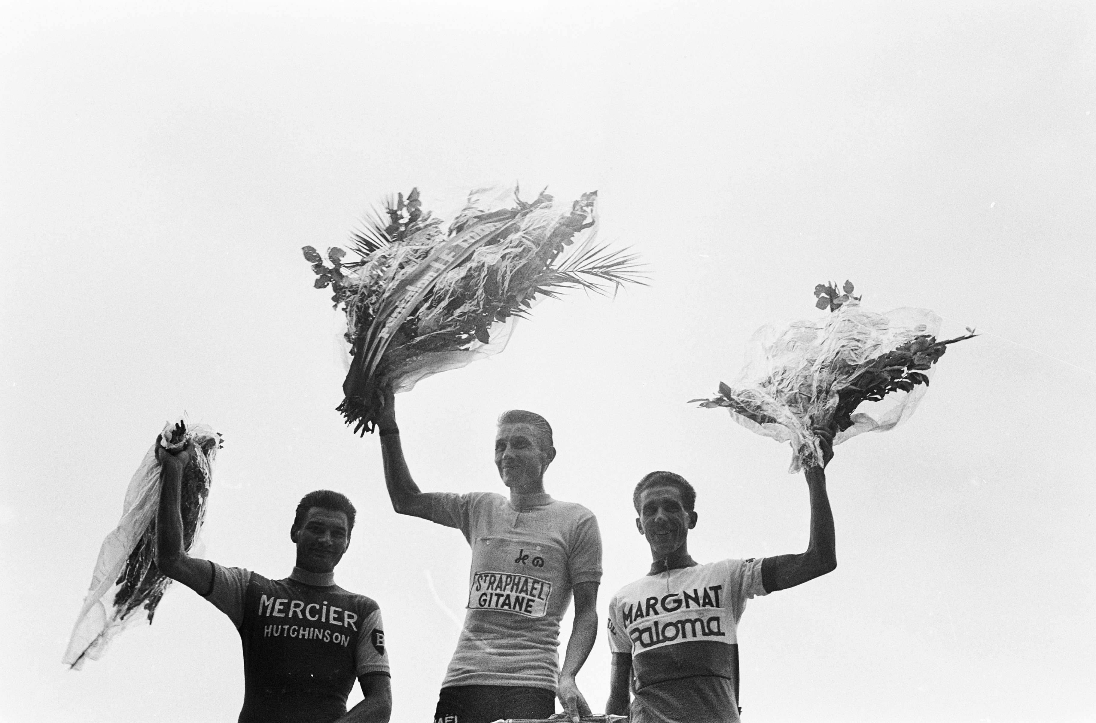 51 edición del Tour de Francia. Podium con Poulidor, Anquetil y Bahamontes.